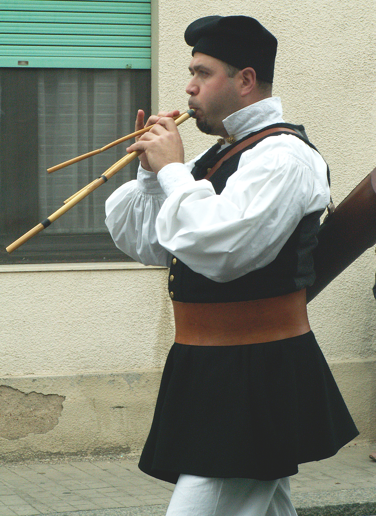 Launeddas' Player